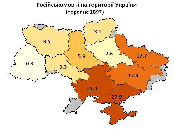 Розселення російськомовного населення на території України за переписами 2001 р. / Russian speakers in present-day Ukraine, 1897 and 1900 censuses